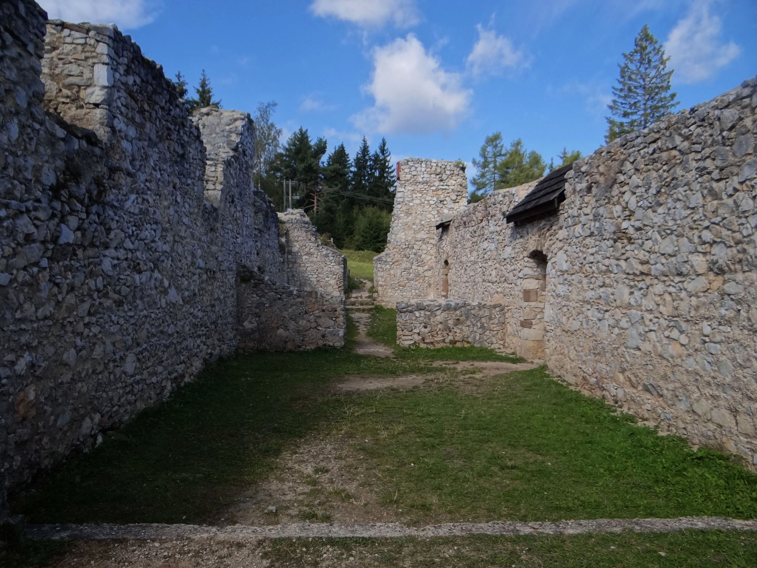 Kláštorisko